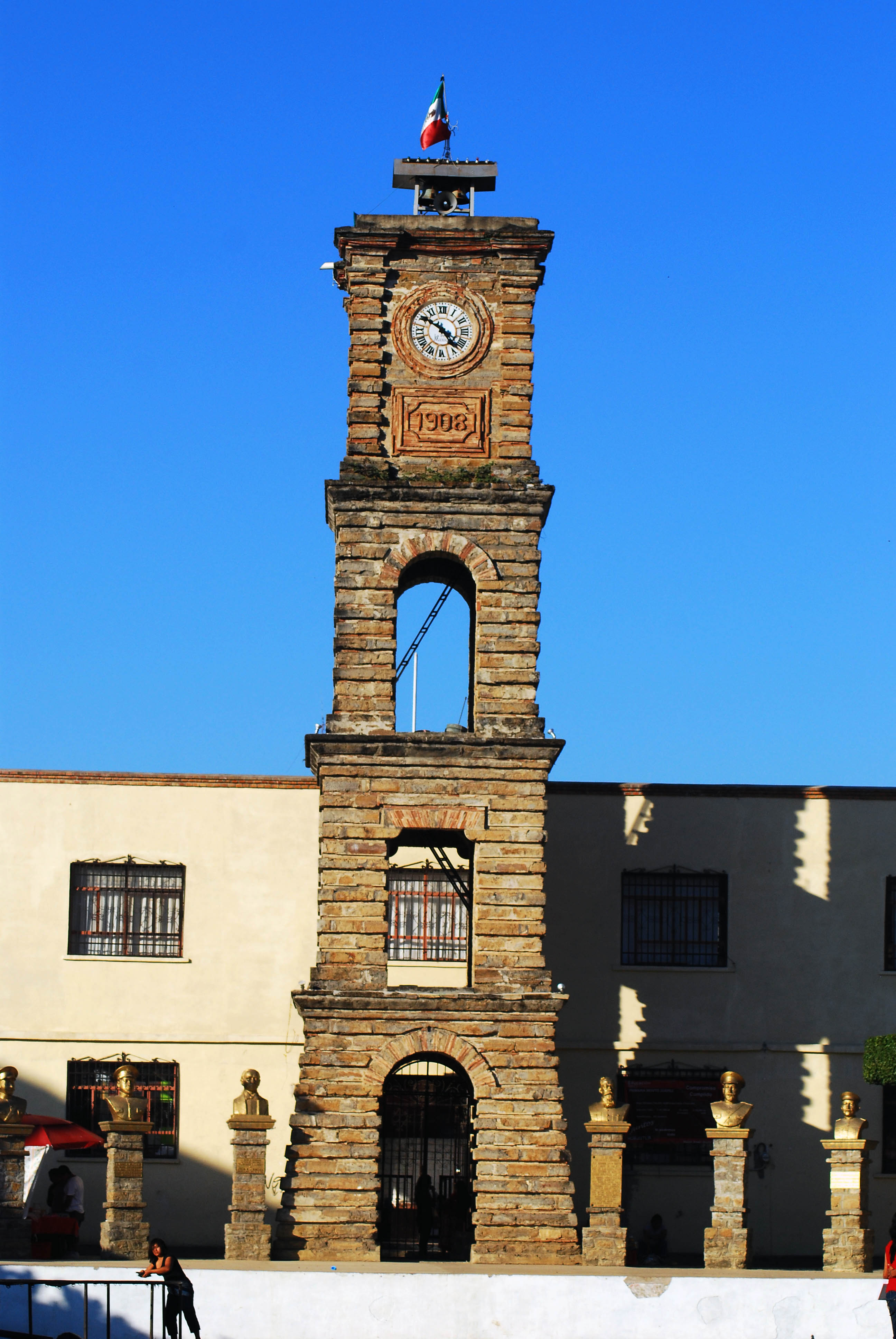 Huejutla de Reyes, Hidalgo